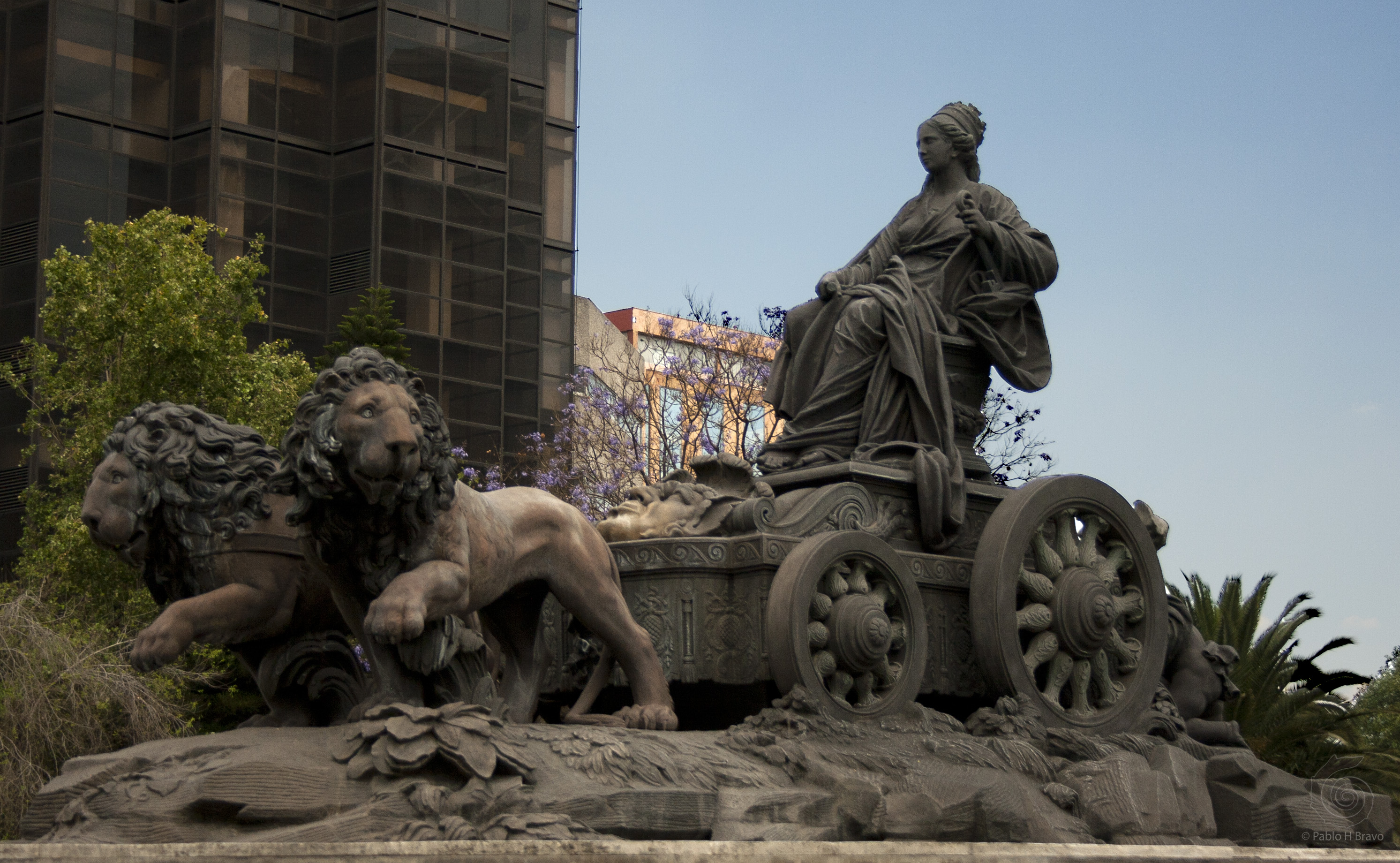 Fotografía de la fuente de Cibeles ubicada en la colonia Roma en el Distrito Federal, México